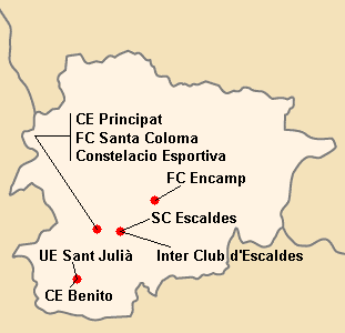 Répartition des clubs de Divisio 1A 1999-2000.